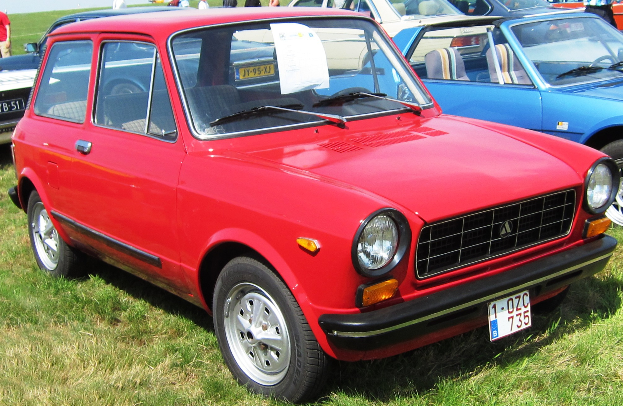 Autobianchi A112 S4 en Belgique